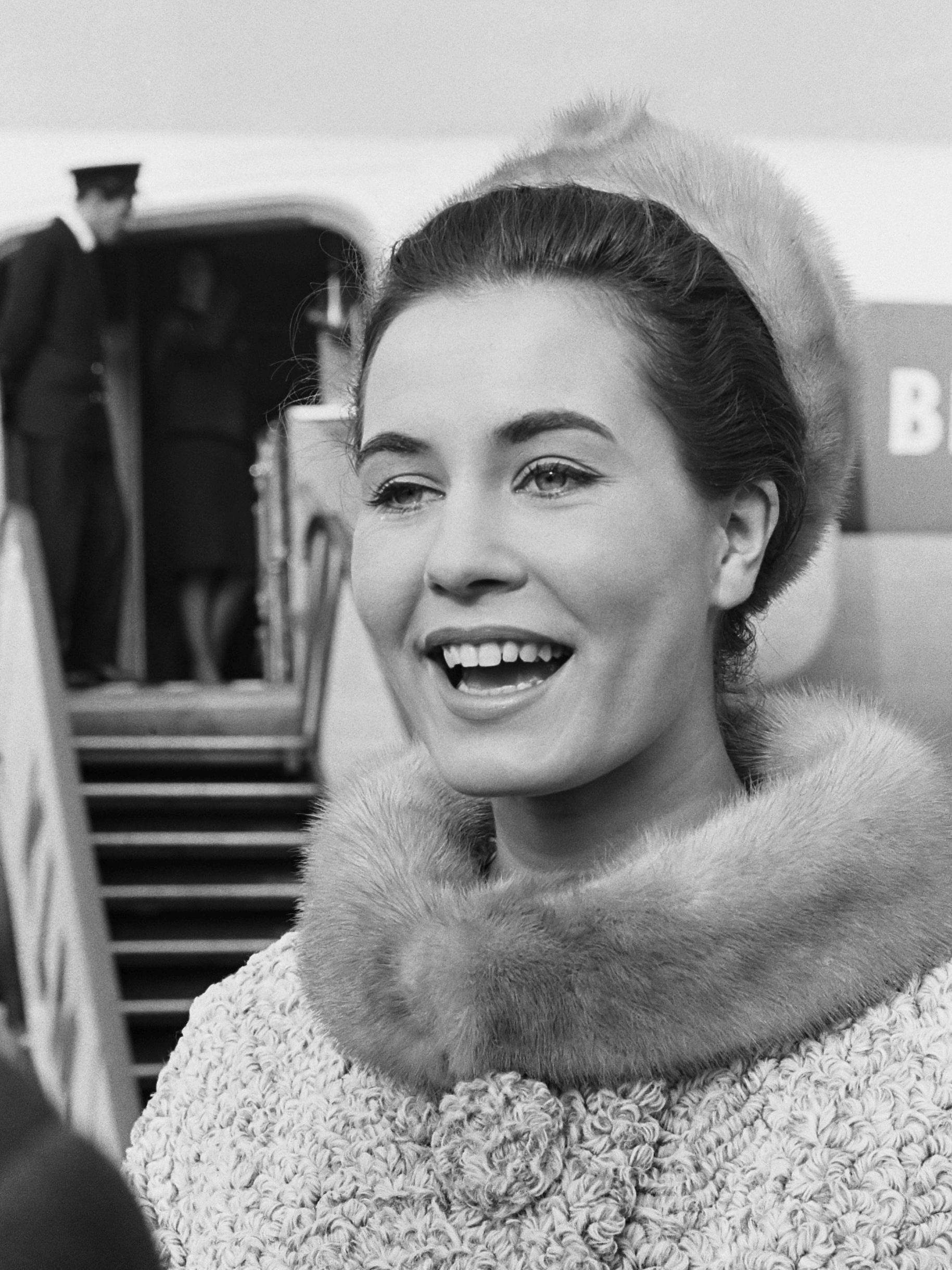 Rina Lodders van Schiphol naar Londen vetrokken om haar kroon te overhandigen 2 november 1963